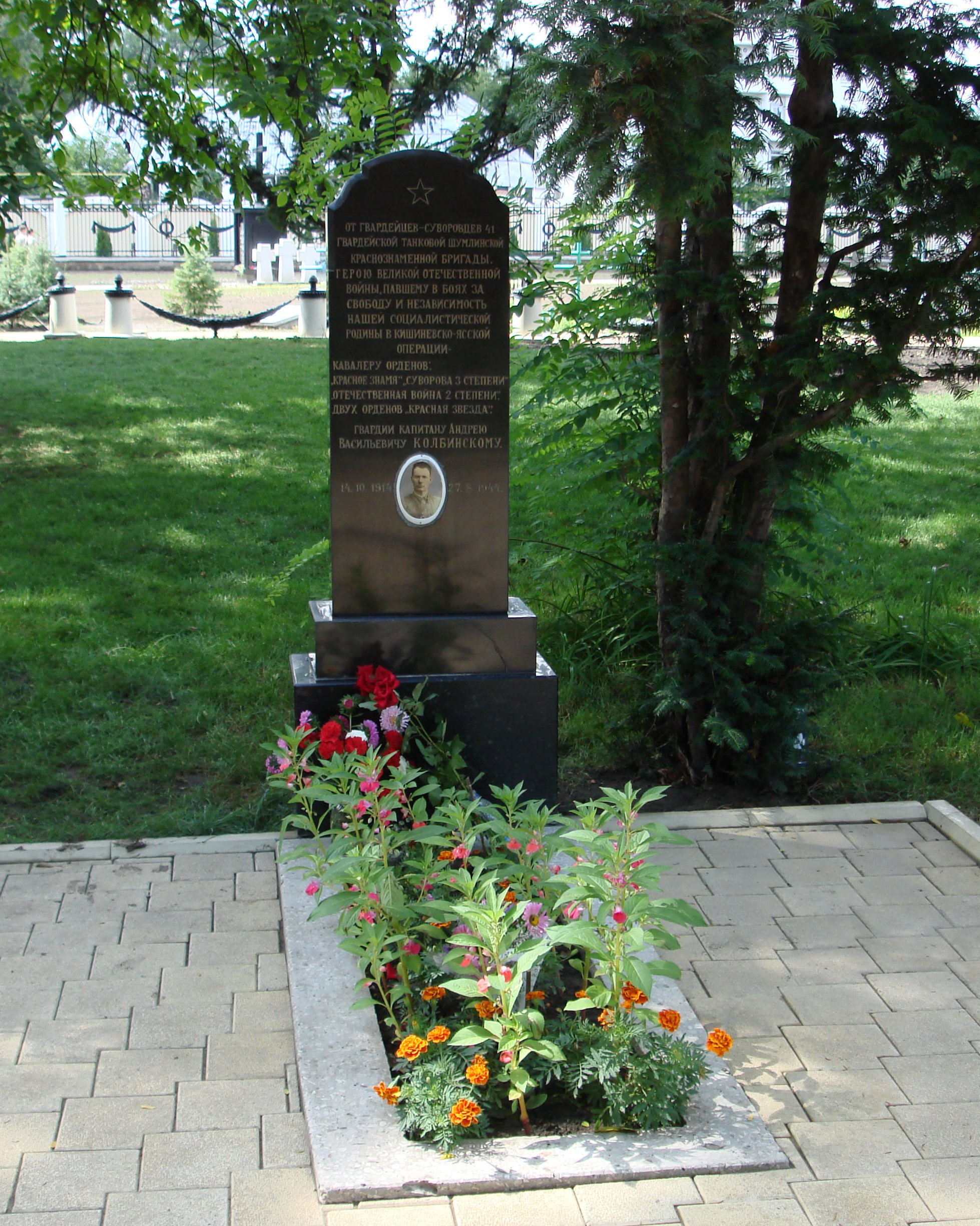 Могила гвардии капитана Андрея Васильевича Колбинского, павшего в боях за освобождение Молдавии в ходе Ясско-Кишинёвской операции